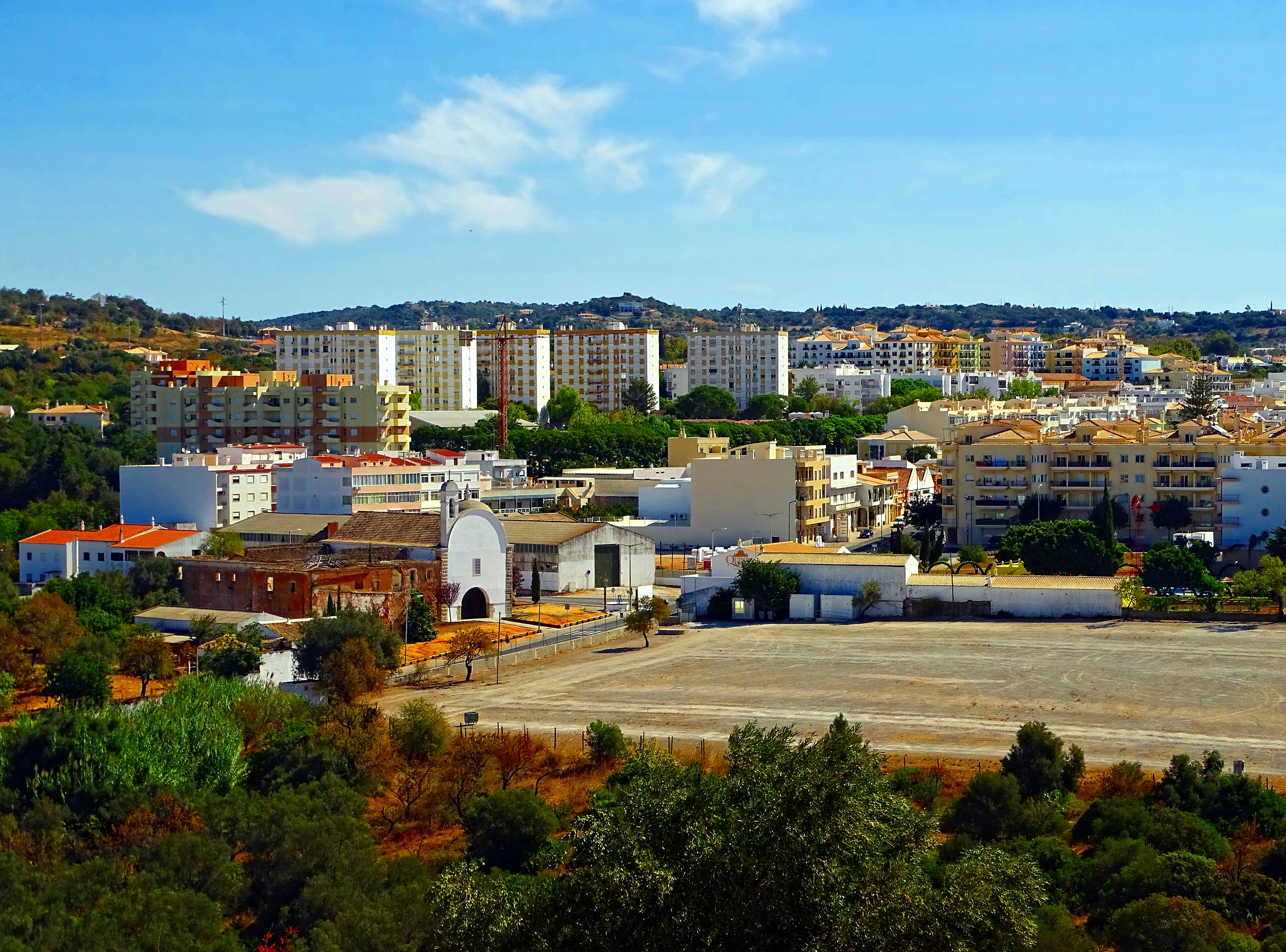 Loule (Portugal)